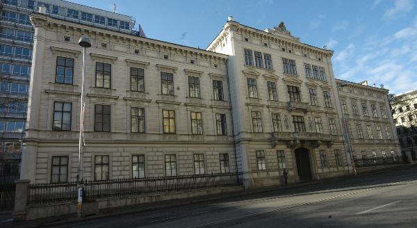 ehemalige Geniedirektion am Getreidemarkt in Wien-Mariahilf